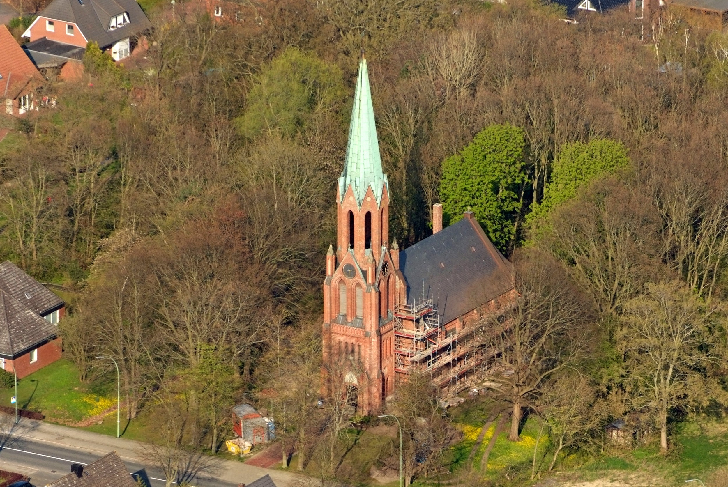 Zionskirche Weddewarden-Imsum (Bremerhaven) / Fotoflug von Nordholz-Spieka nach Oldenburg und Papenburg